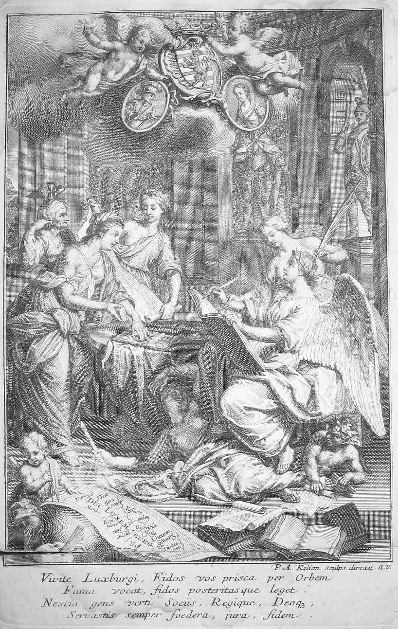 Allegorie vun der Geschichtsschreiwung iwwer Lëtzebuerg. Kofferstéch vum Philipp Andreas Kilian am éischte Band vum Jean Bertholet senger Histoire ecclésiastique et civile du Duché de Luxembourg et Comté de Chiny.